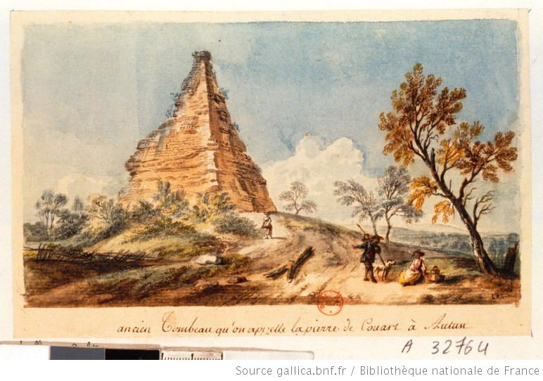 Dessin à la plume et encre brune, aquarelle et rehauts de gouache représentant la pyramide de Couhard (Jean-Baptiste Lallemand 1716?-1803?)